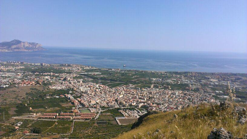 Vista panoramica di Villabate da Montagna Grande